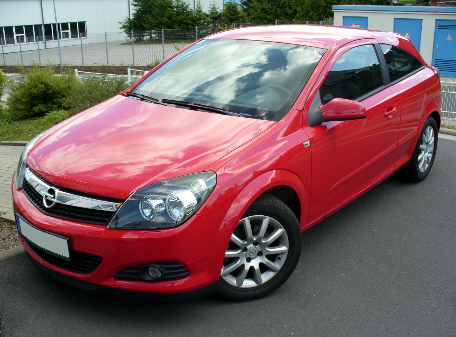 Opel Astra H GTC Facelift